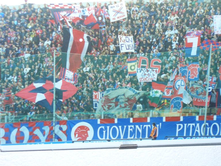 La curva sud del Crotone durante il primo campionato in serie cadetta.